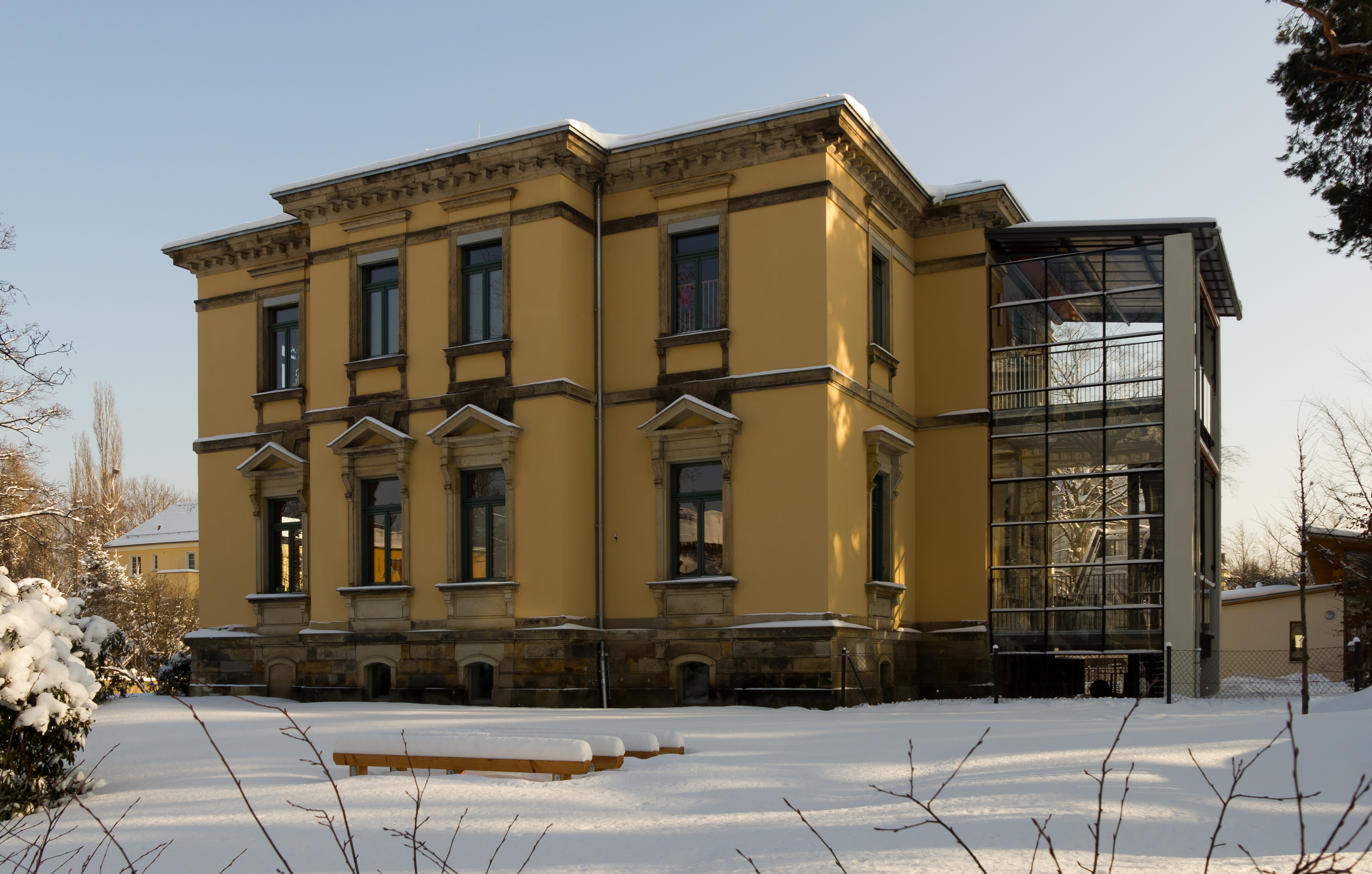 Villa in Dresden-Striesen, Niederwaldstraße 2. Baujahr 1887/1888